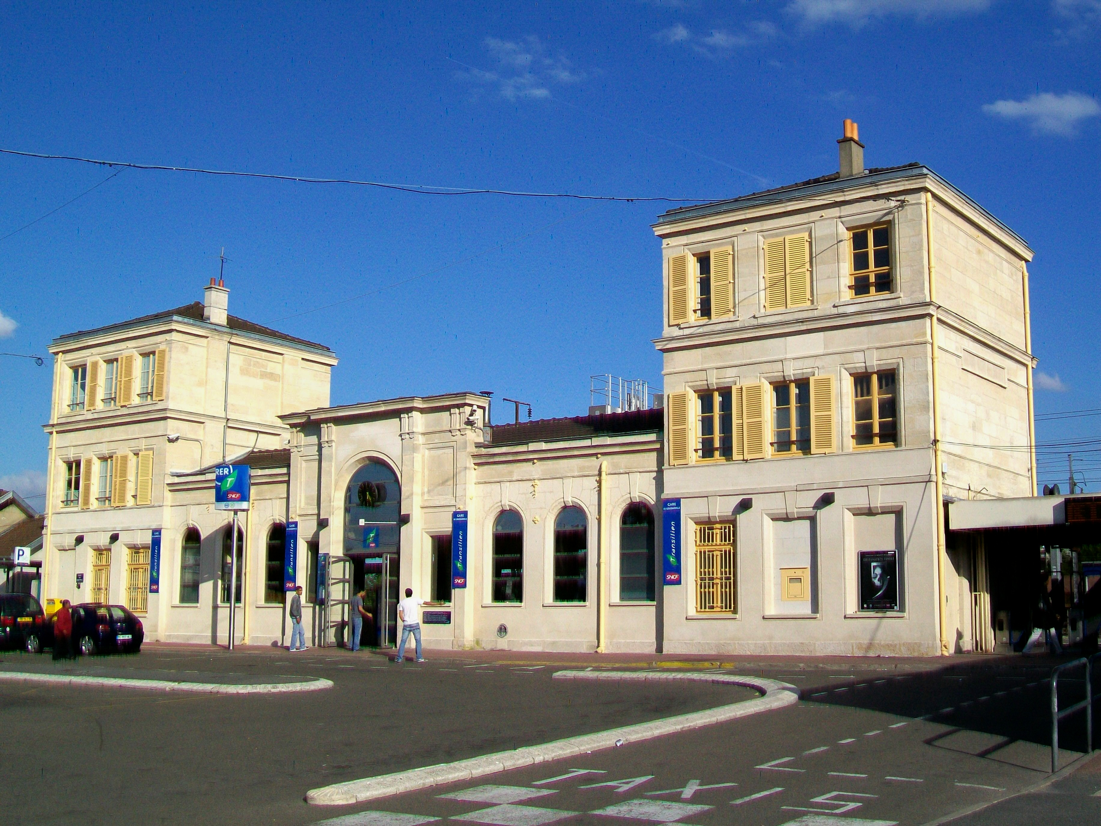 Le bâtiment voyageurs après rénovation, façade sur la cour, avec la gare routière.